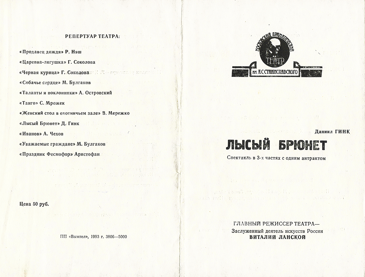 Програмка первого спектакля Петра мамонова "Лысый брюнет"